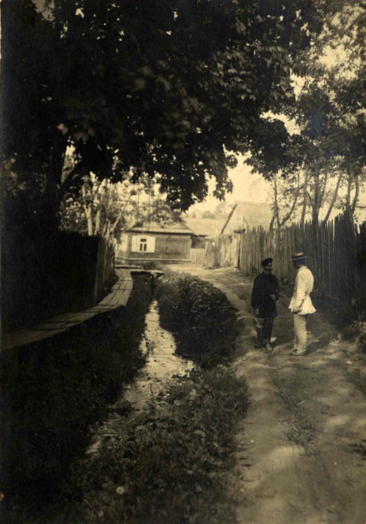 Беларуская (тарашкевіца): Менск (Miensk), рака Няміга (Niamiha) ў прадмесьці Грушаўцы (Hrušaŭka)